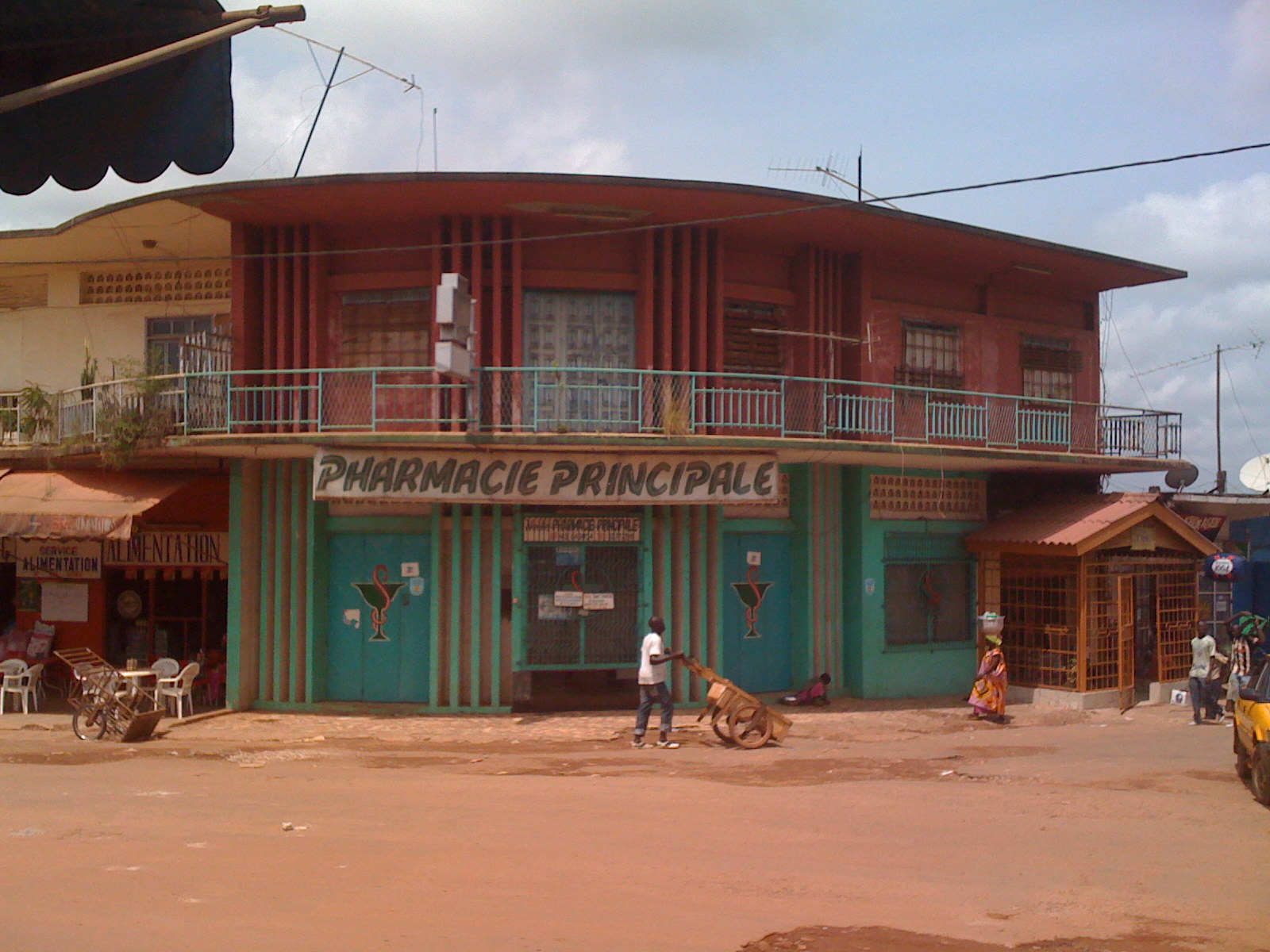 Officine privée de pharmacie à Gagnoa (Côte d'Ivoire)